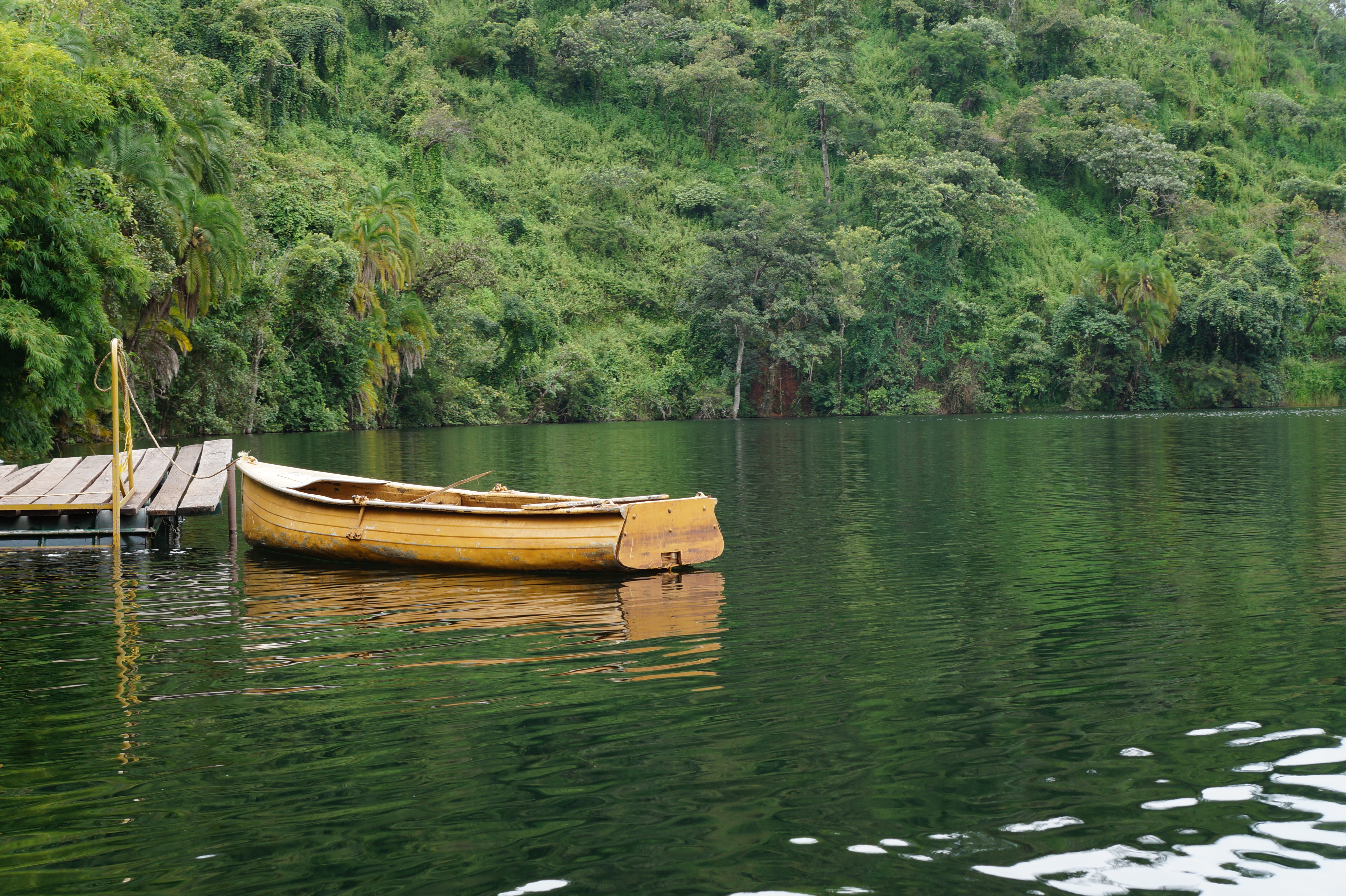 Le lac de N'Gaoundaba situé à une quarantaine de km de la ville de N'Gaoundéré sur la RN3 en venant de Bertoua. Région : Adamaoua